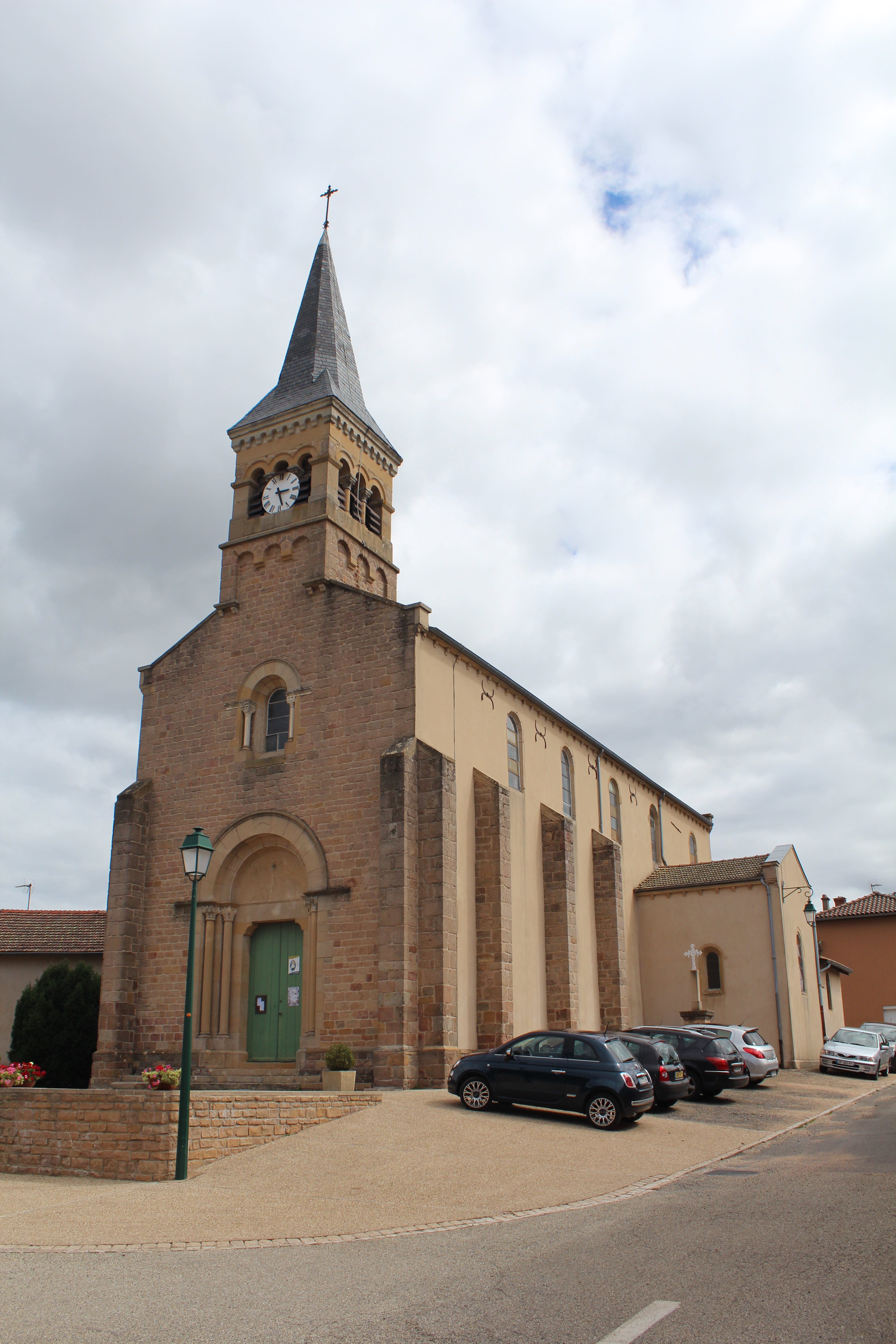 Église Saint-Pierre de Pruzilly.